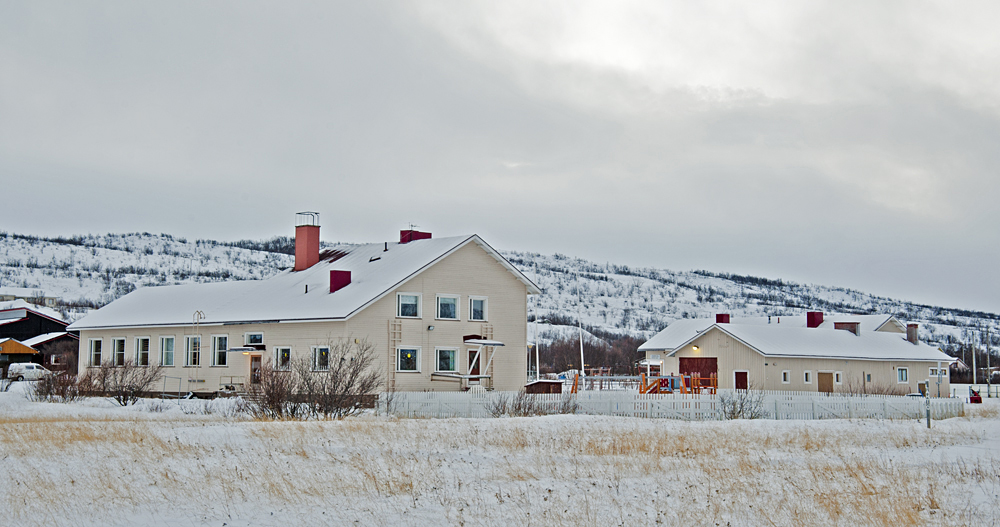 Lågstadieskolan i Nuorgam by, Utsjoki, Finland.